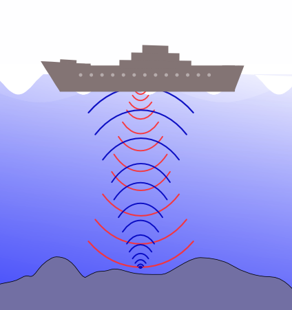 Mit Inkscape selber gezeichnet.